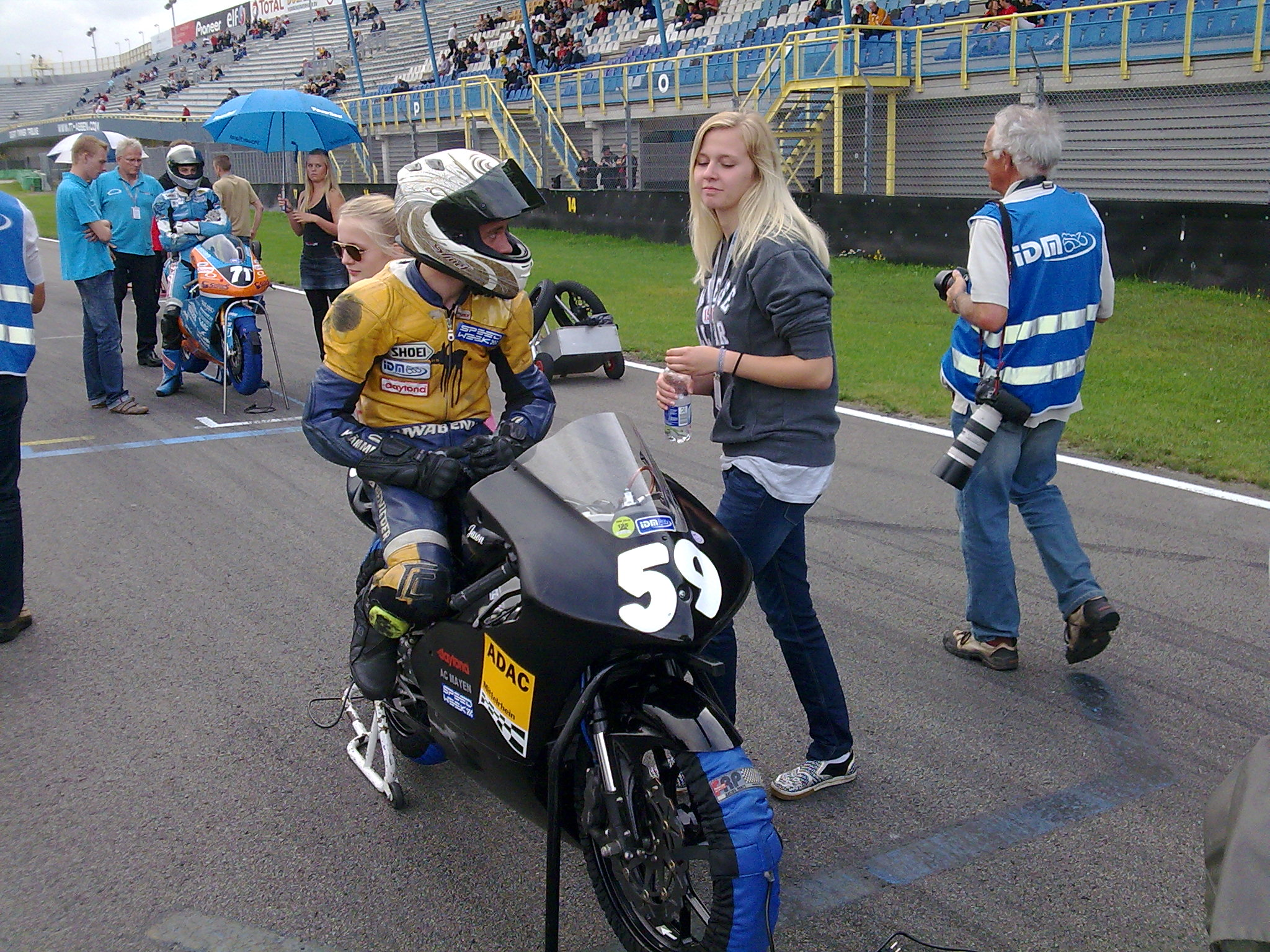 Daniel Kämmerling in der Startaufstellung zum Rennen der IDM-125ccm in Assen 2010